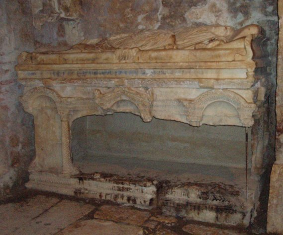 Sarcophage, où fut inhumé Saint Nicolas.